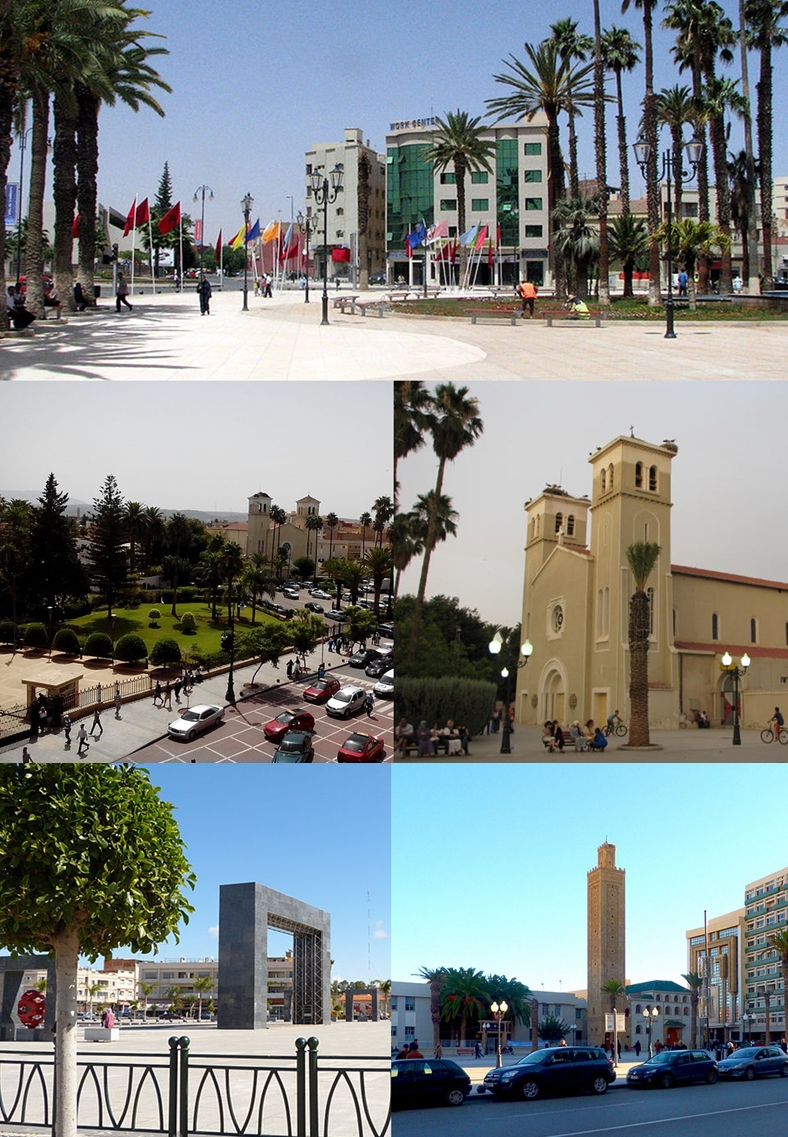 OUJDA